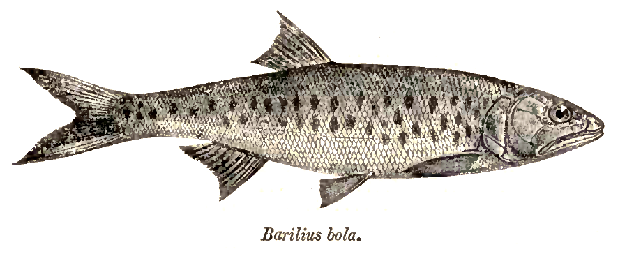 Barilius bola = Raiamas bola (Hamilton, 1822)